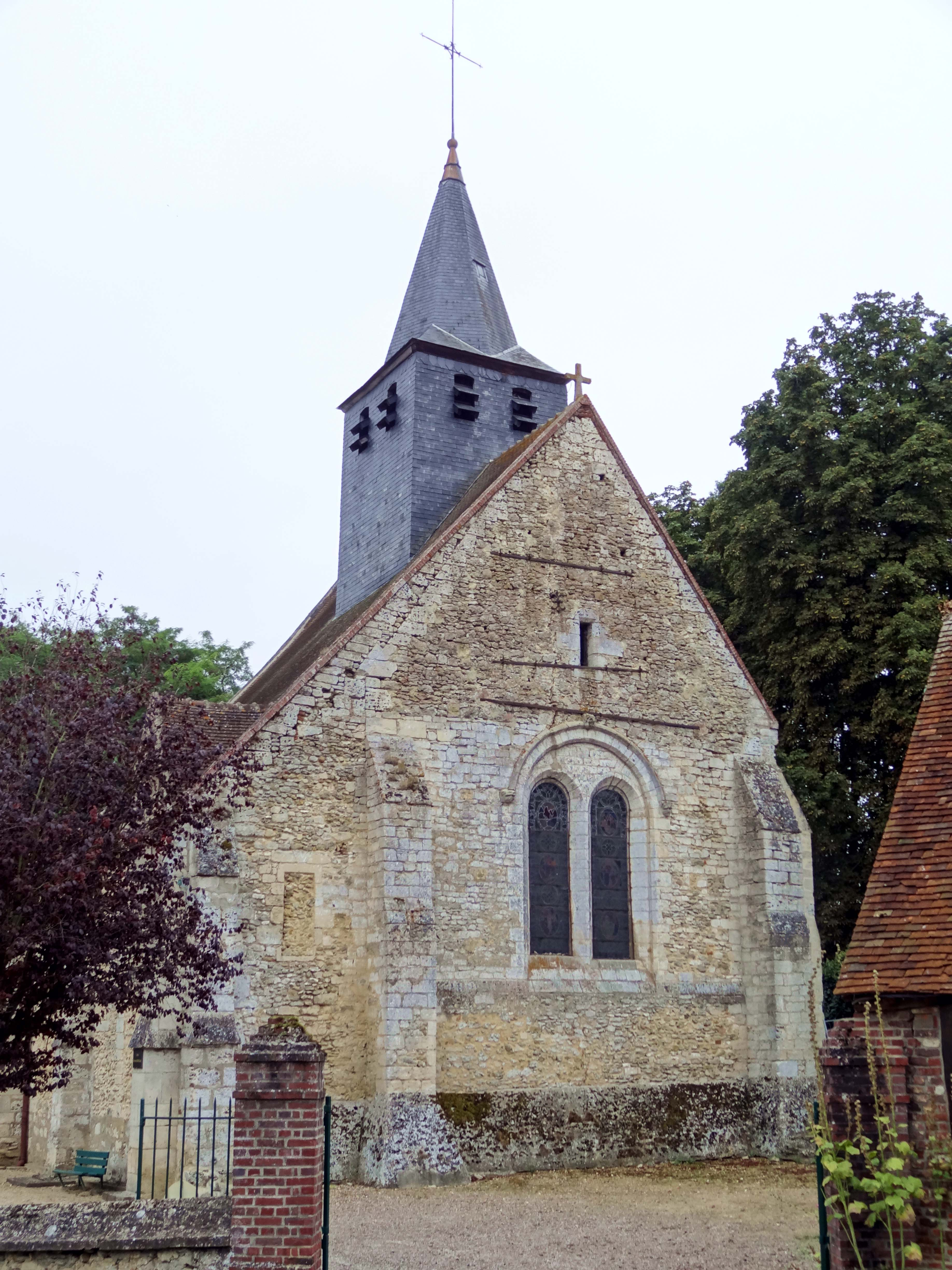 Église Saint-Remi de Ponchon - voir titre.